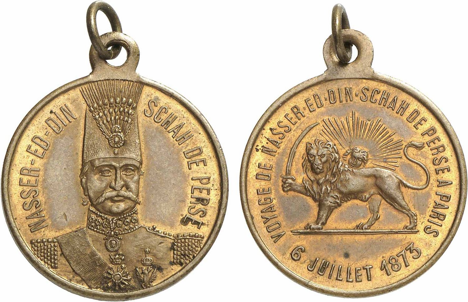 مدال برنز یادبود سفر ناصرالدین شاه به فرانسه